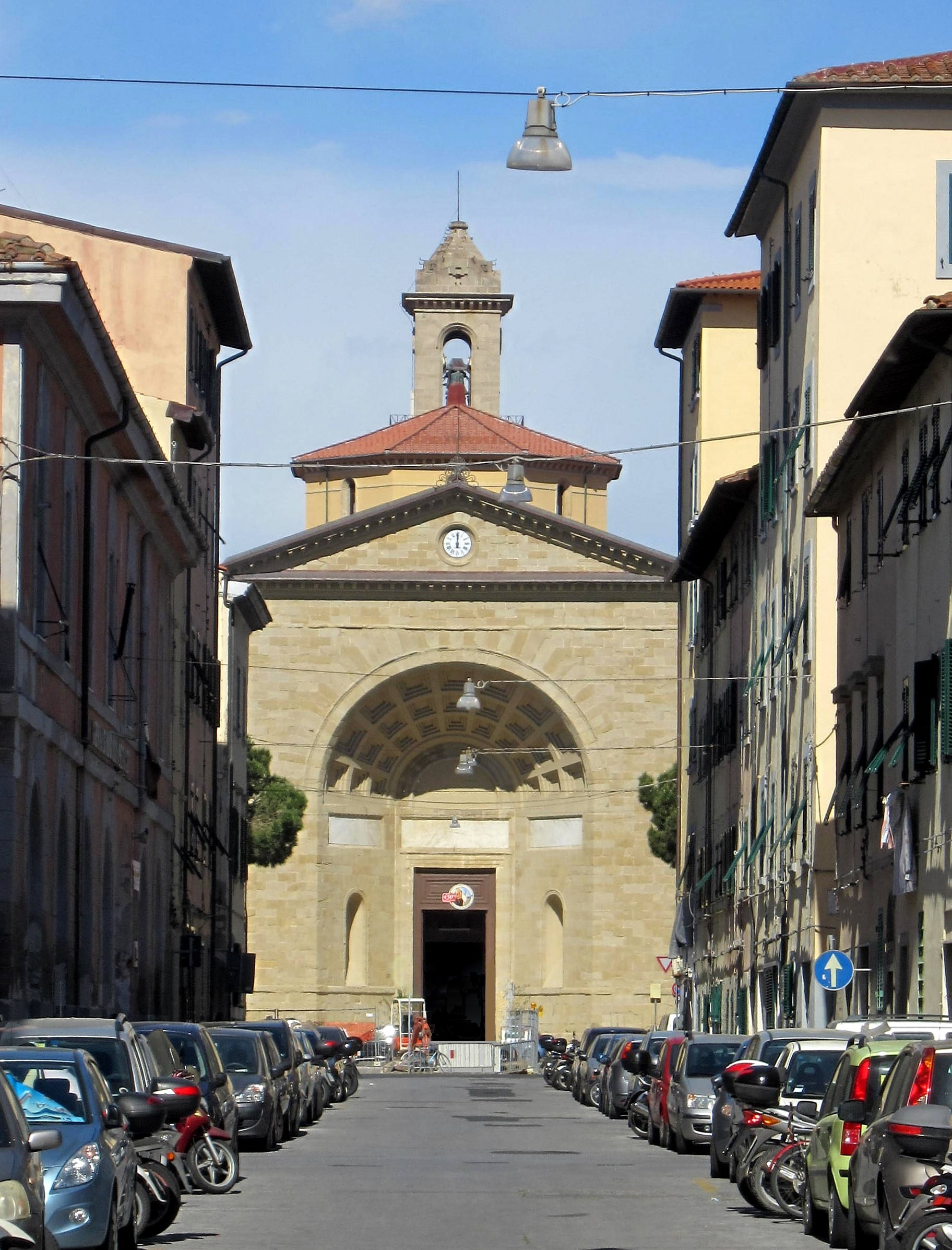 Chiesa di San Giuseppe in Piazza 2 Giugno a Livorno